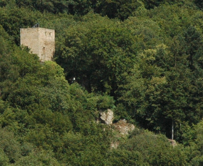 Ruine der Burg Alt-Wolfstein